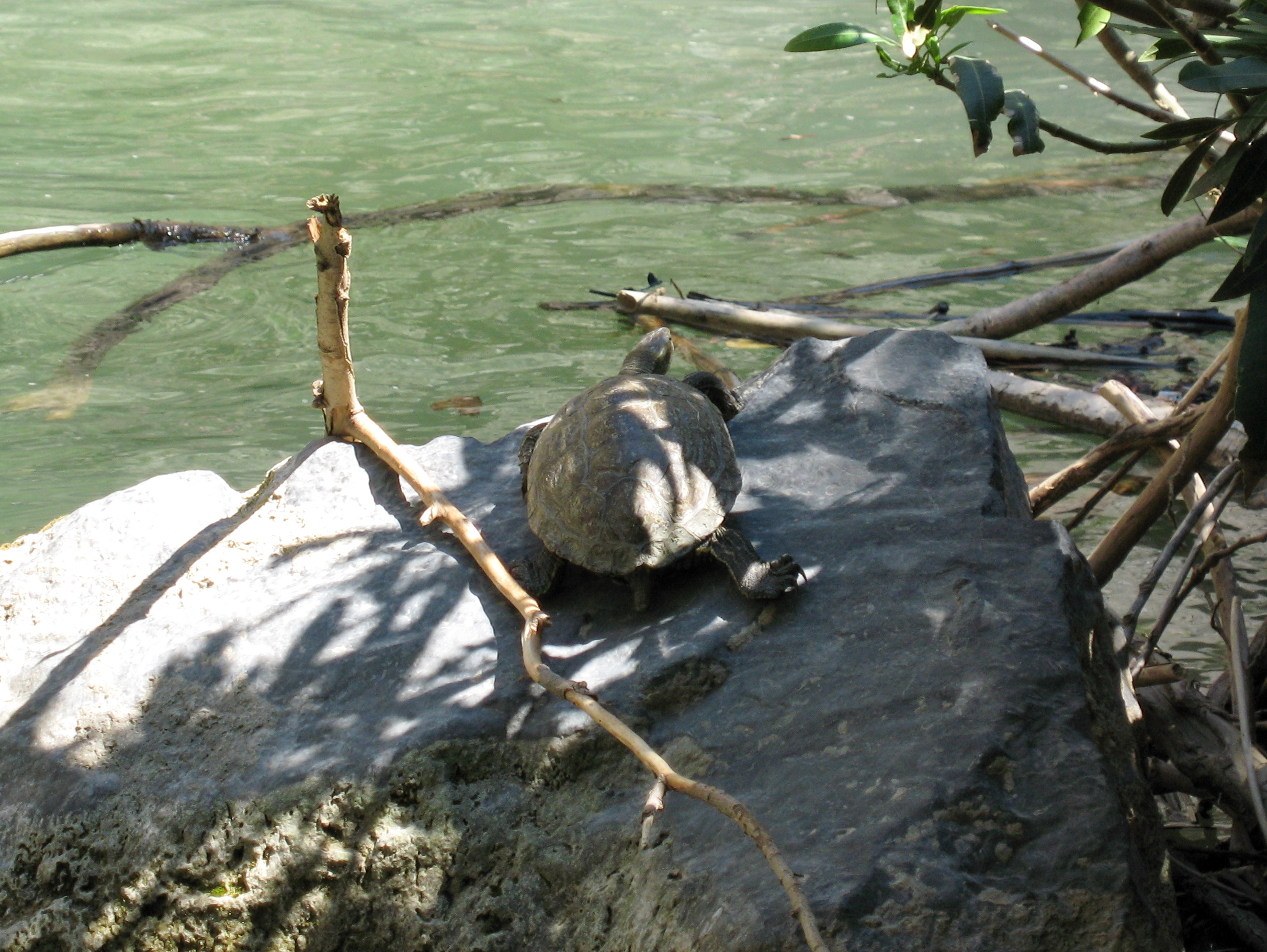 Westkaspische Bachschildkröte (Mauremys rivulata) am Unterlauf des Megalopotamos, Gemeinde Agios Vasilios, Regionalbezirk Rethymno, Kreta, Griechenland